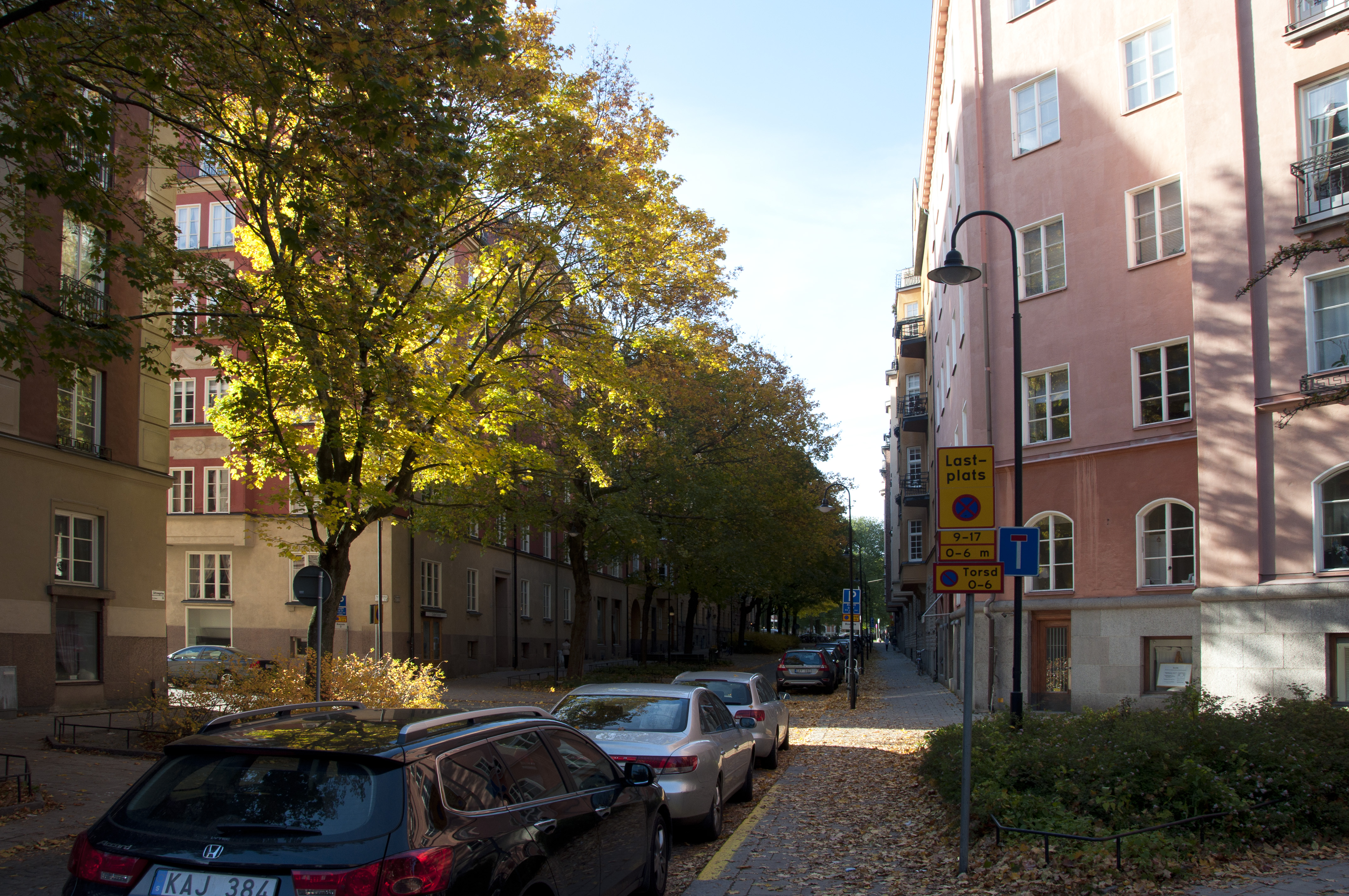 Lützengatan